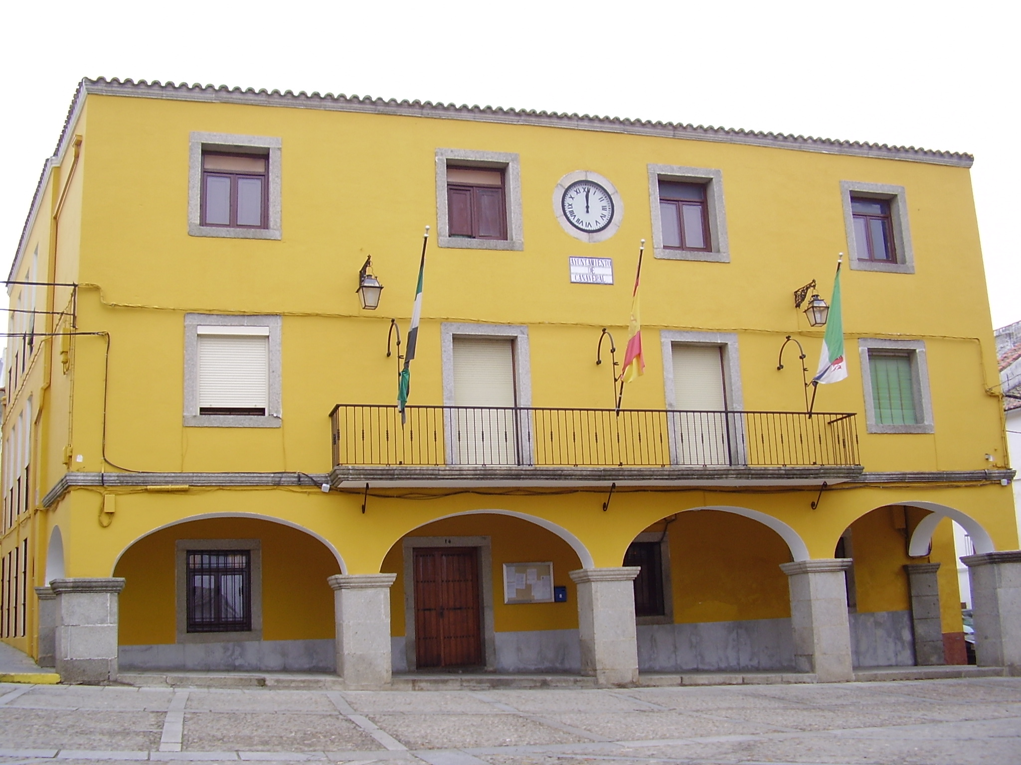 Ayuntamiento del municipio de Cañaveral (provincia de Cáceres, España)